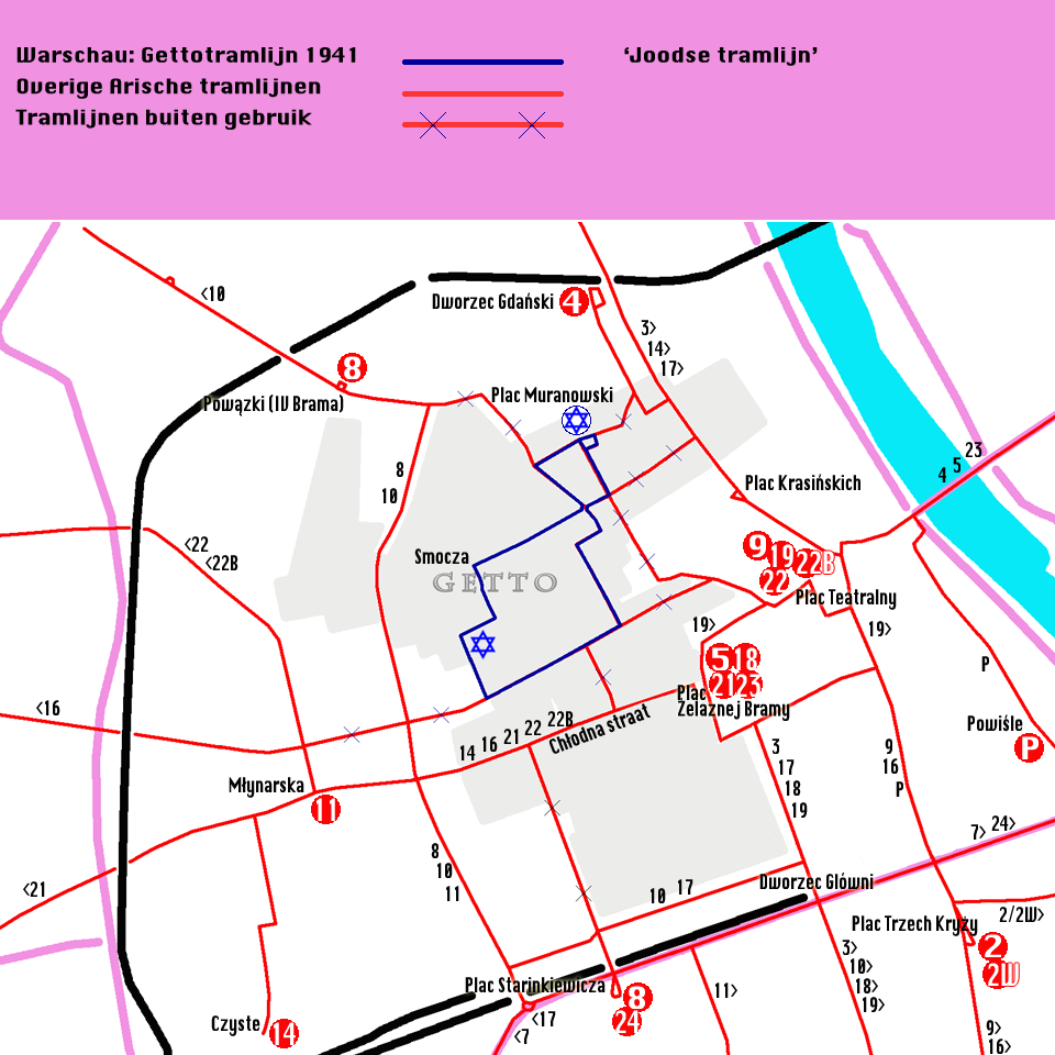 Tramlijnen in en rond het getto van Warschau, 1941